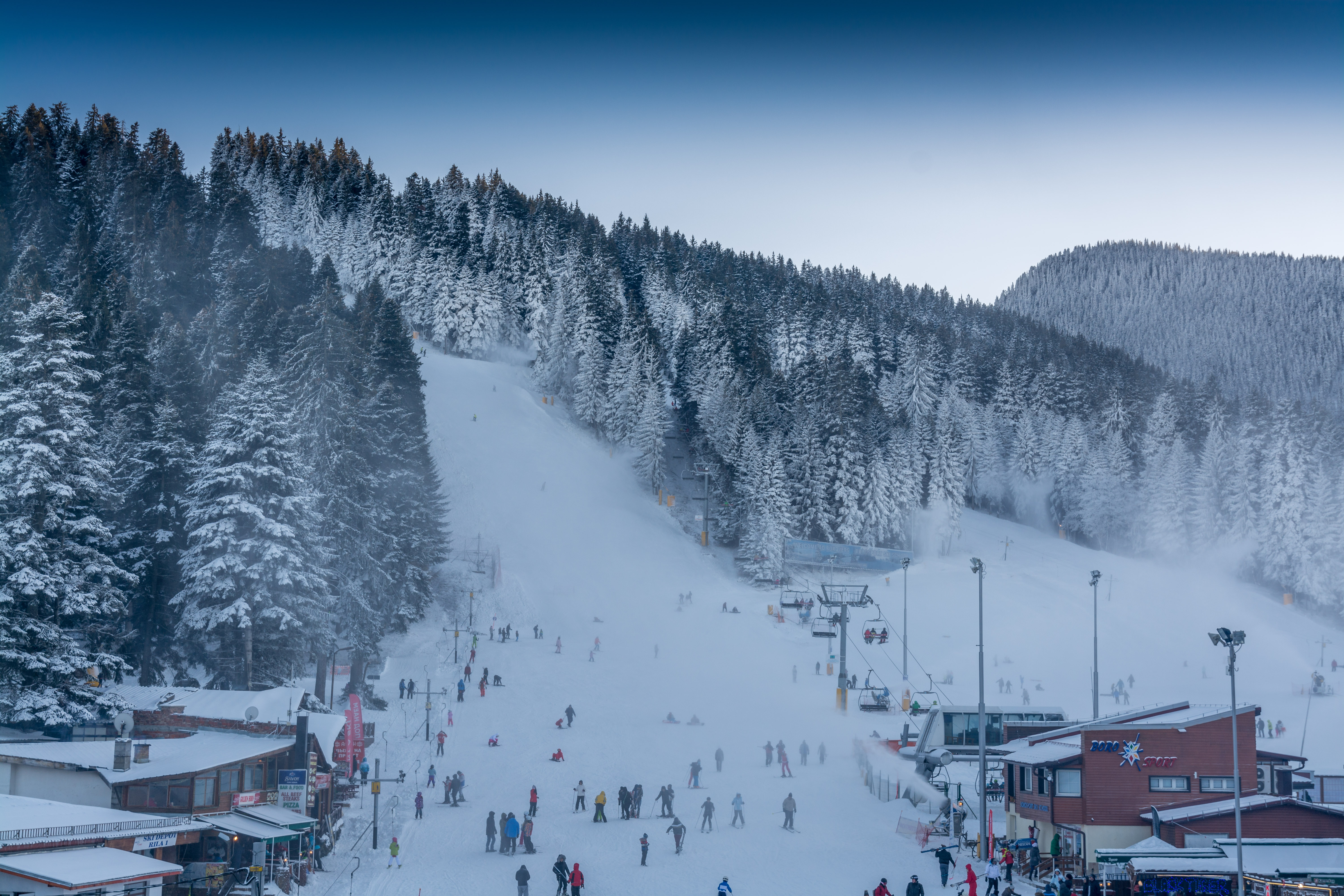 Боровец, 01.01.2016